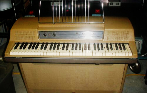 Ein Wurlitzer Console, beige